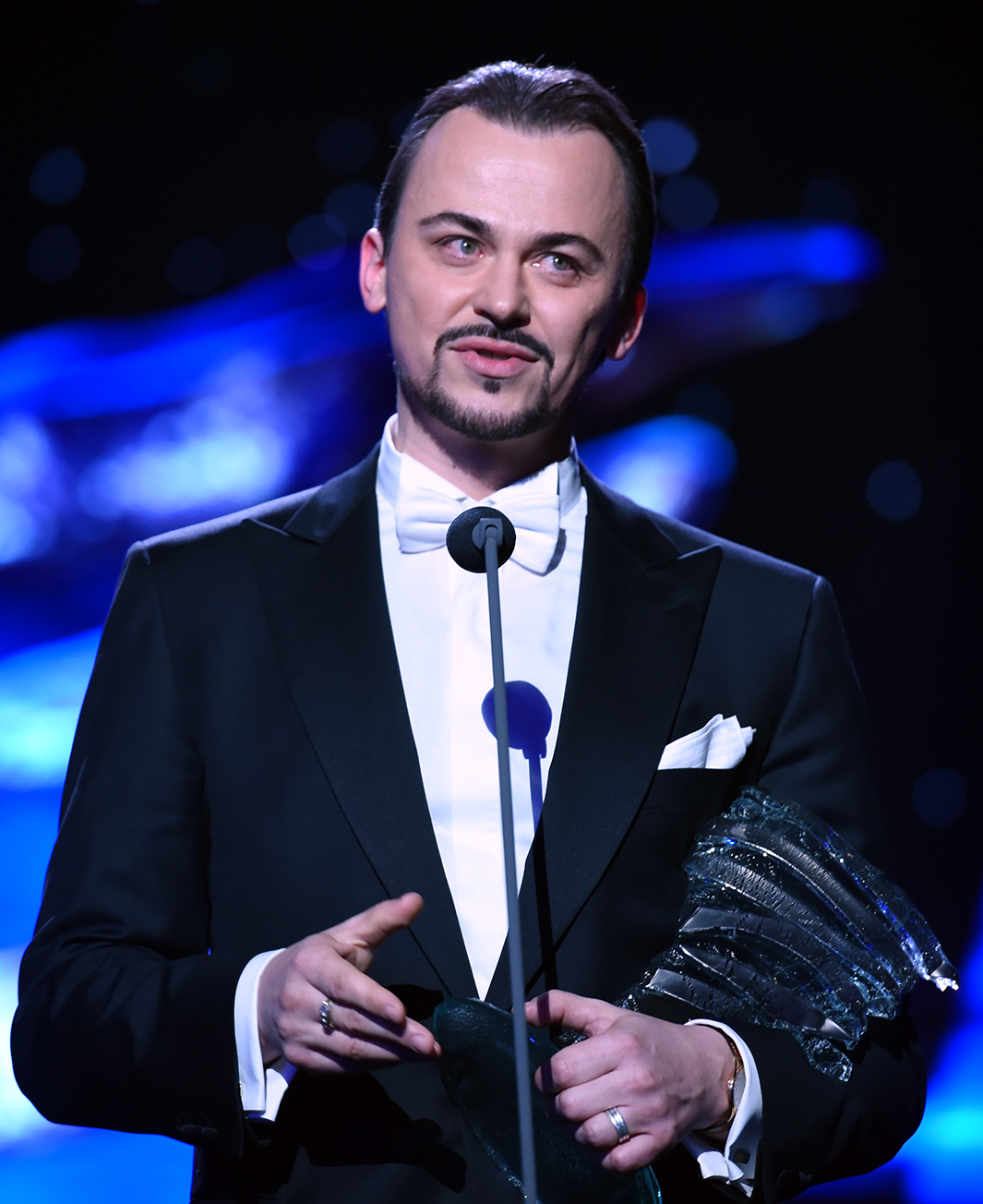 Štefan Kocán, 2016